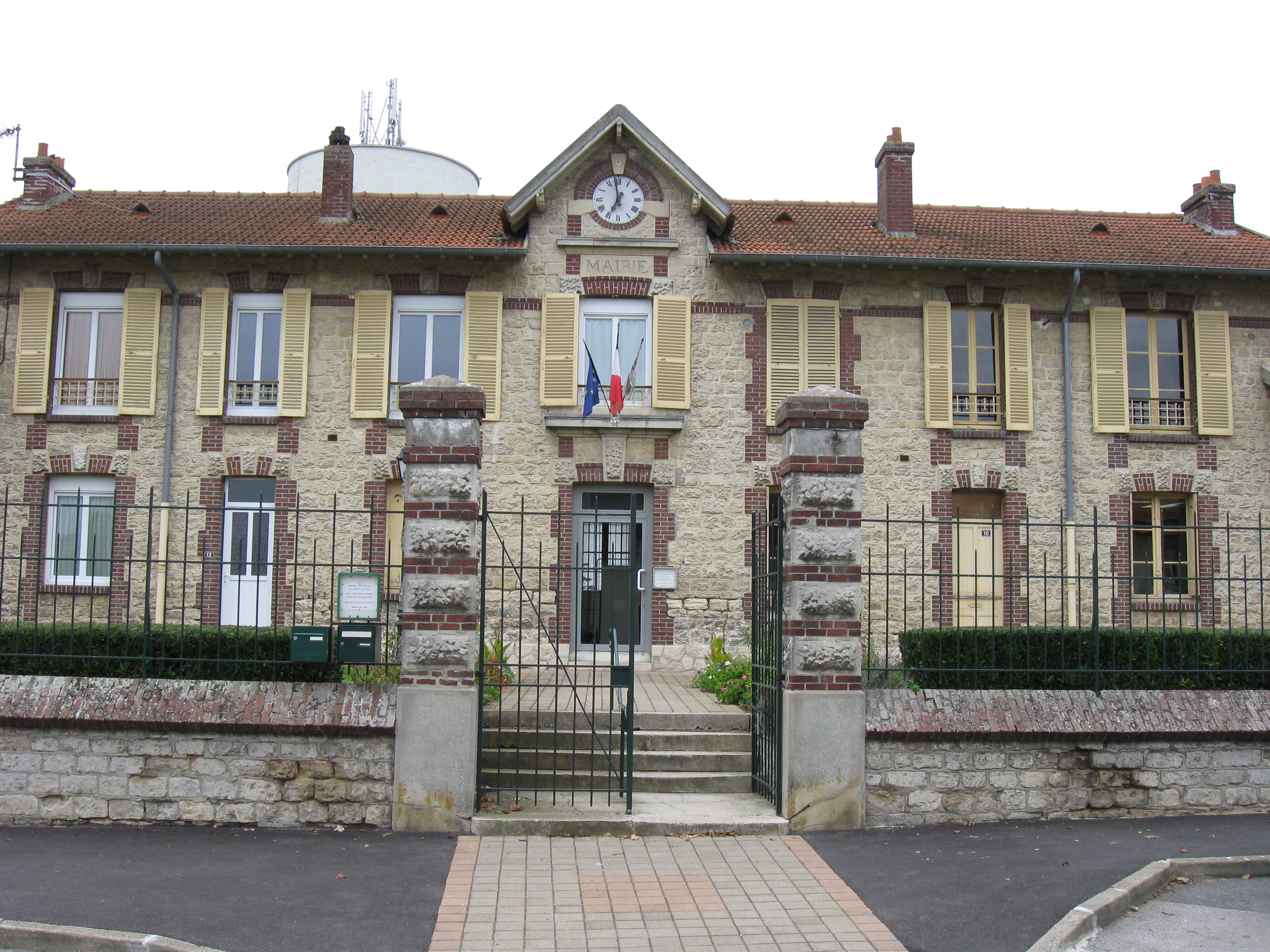 Mairie de Juilly. (Seine-et-Marne, région Île-de-France).